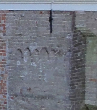 Detail van de noordelijke muur van de kerk van Brantgum, rijksmonument